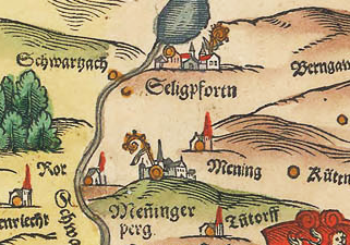 Baierische Landtafel - Ausschnitt Kloster Selingenporten und Schloss Pyrbaum